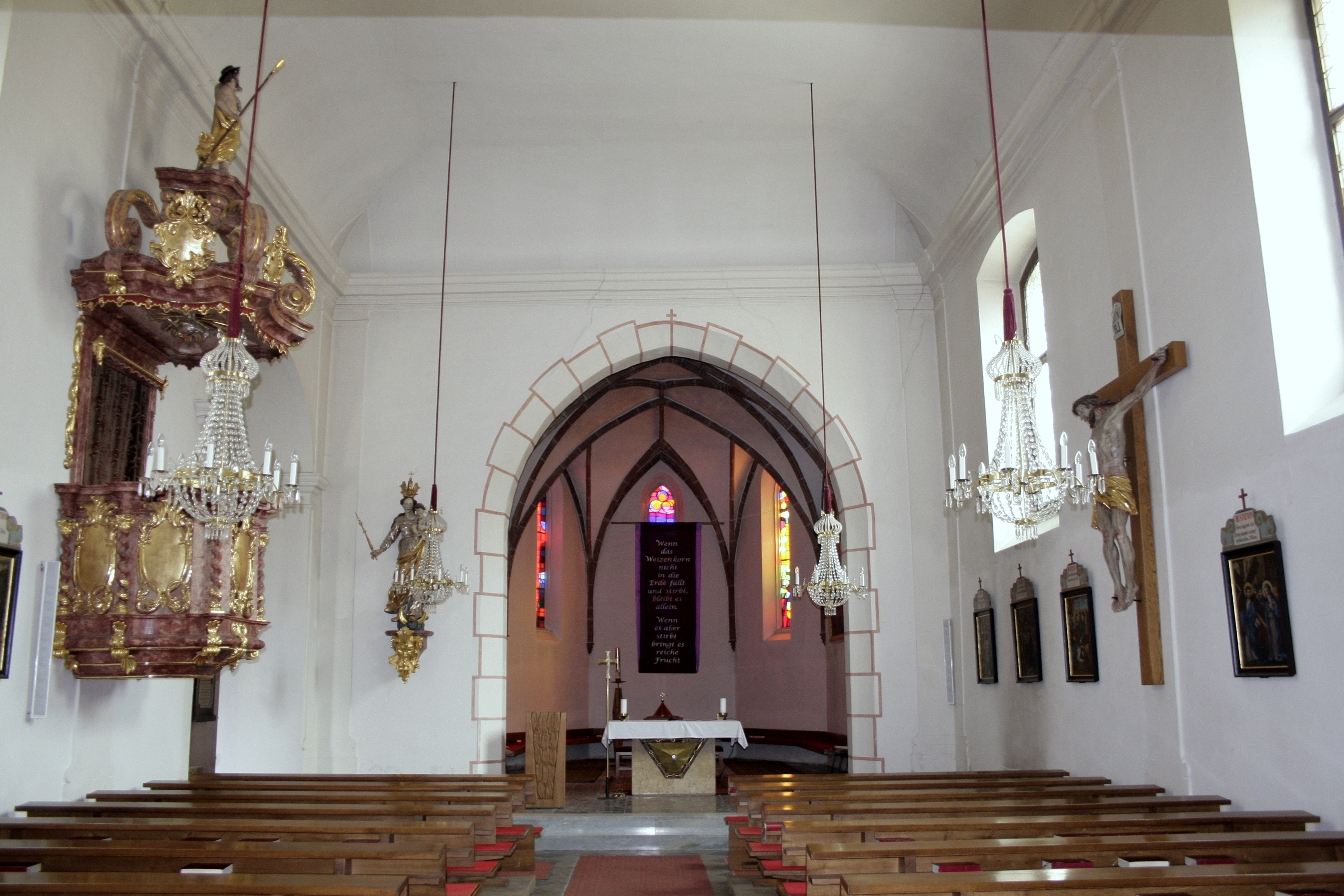 Kath. Pfarrkirche hl. Andreas